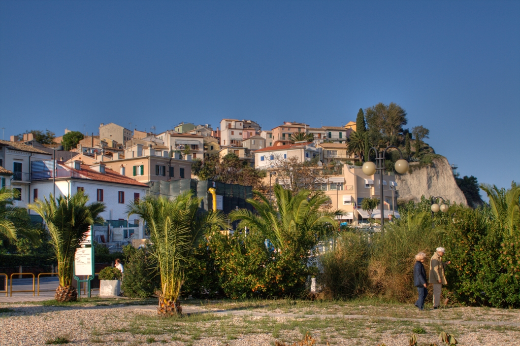 Vista di Numana.